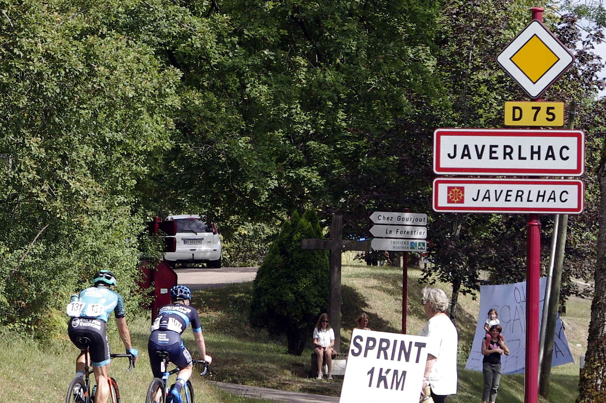 Tour du Limousin 2020. Traversée de Javerlhac en Dordogne